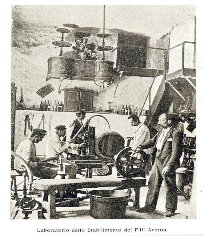 Fotografia del Laboratorio dello Stabilimento dei Fratelli Averna in La Sicilia Illustrata, Rivista mensile d'arte, gran mondo, letteratura, turismo, automobilismo, teatri, eleganze, confort, industria e commercio, IX (1911), 3 (SAS Modica, Biblioteca Grimaldi, n. 2767)